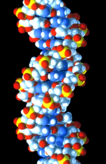 Molécule d'ADN (image Commons retravaillée)